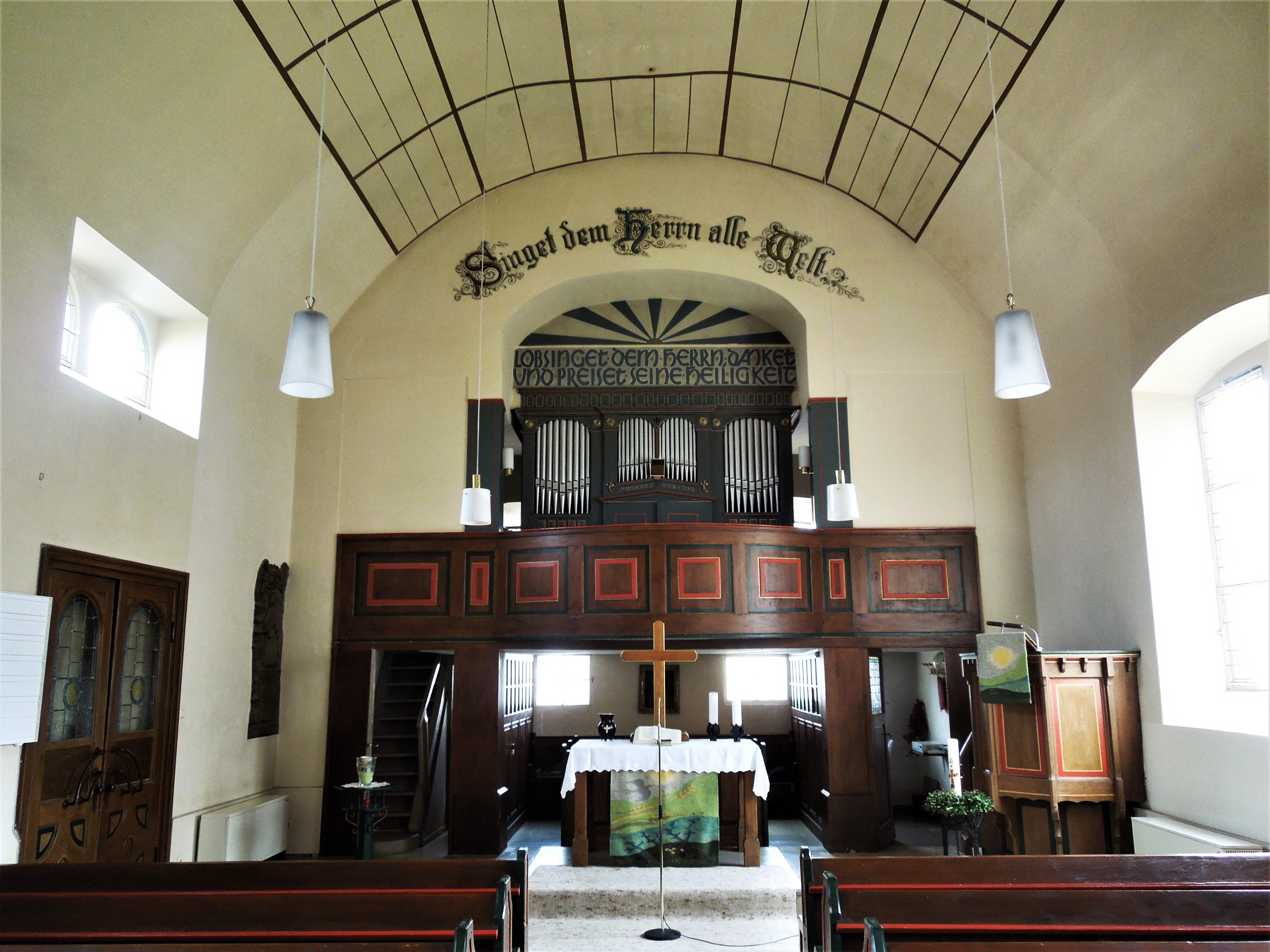 Wichdorf: das Innere der ev. Dorfkirche